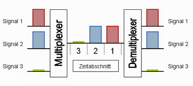 Schematische Darstellung des synchronen Zeitmultiplexverfahren